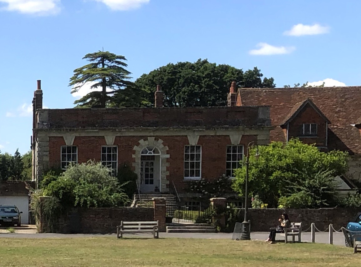 Hemingsby House im Jahr 2019